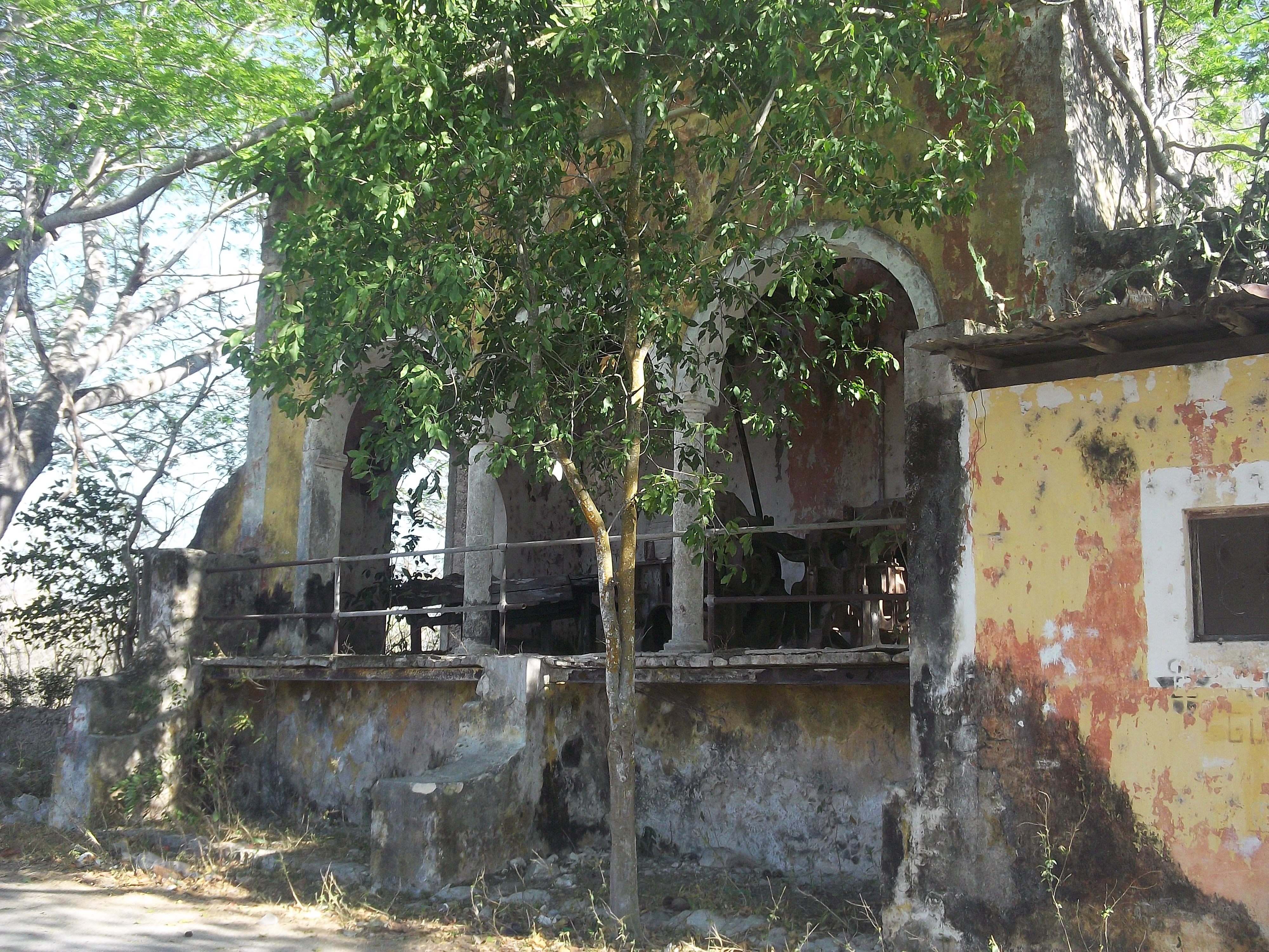 Misnebalam, Yucatán.